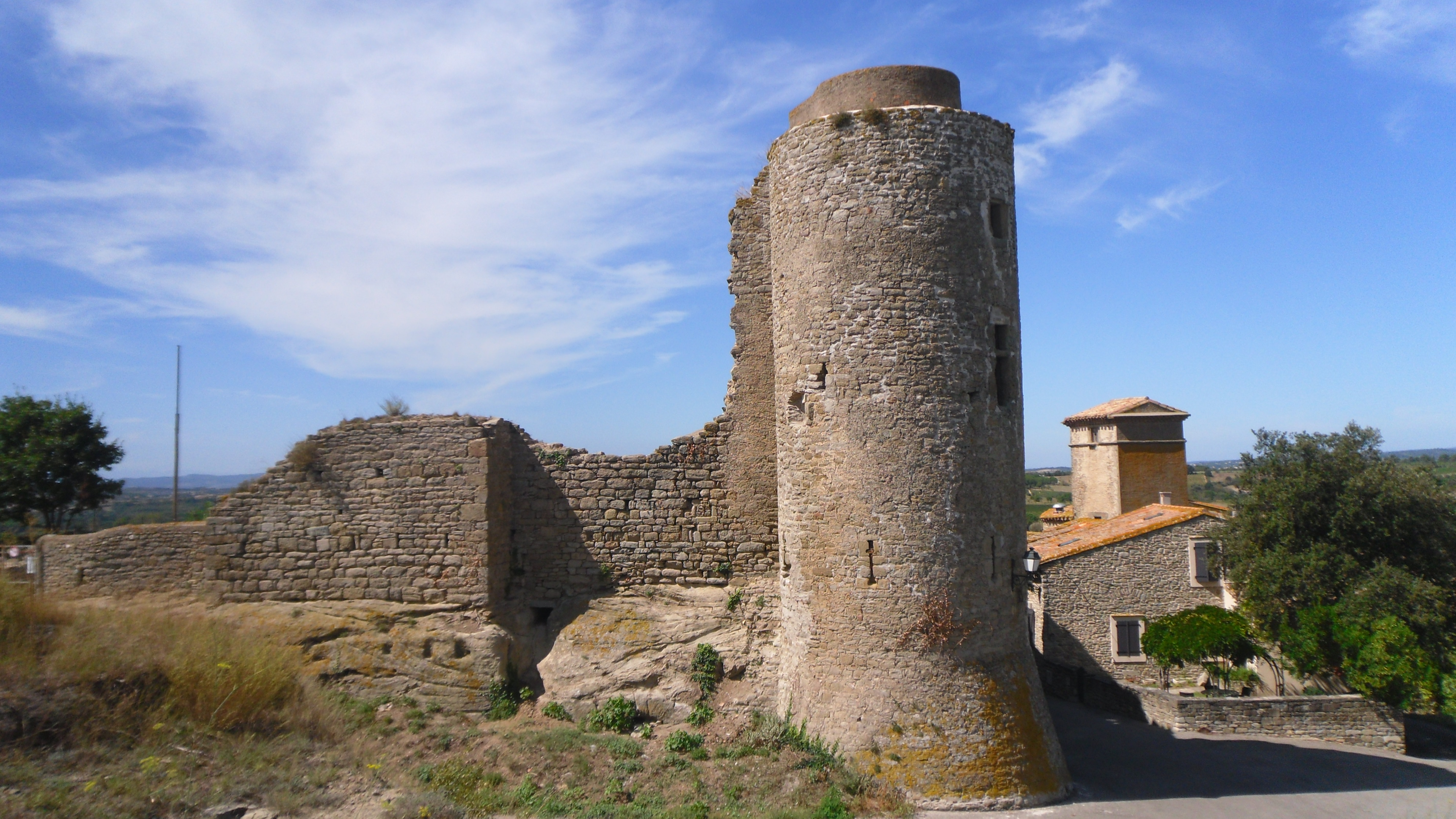 Bouilhonac château